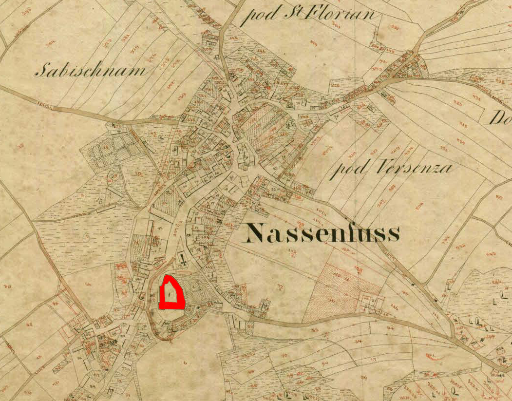 Reambulančni kataster za Kranjsko, 1867-1882